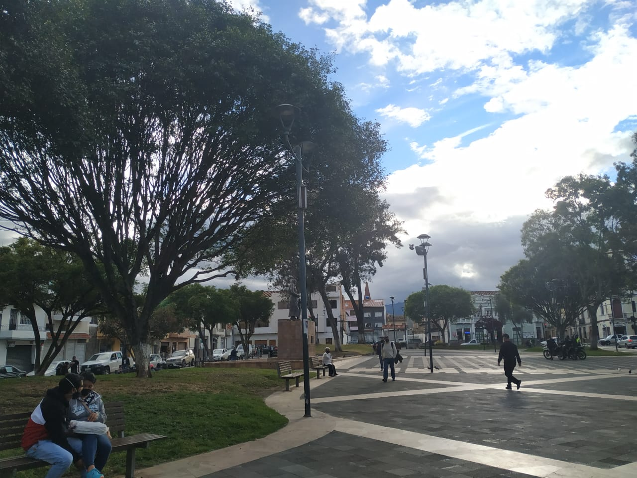 Vista lateral de la plaza de María Auxiliadora